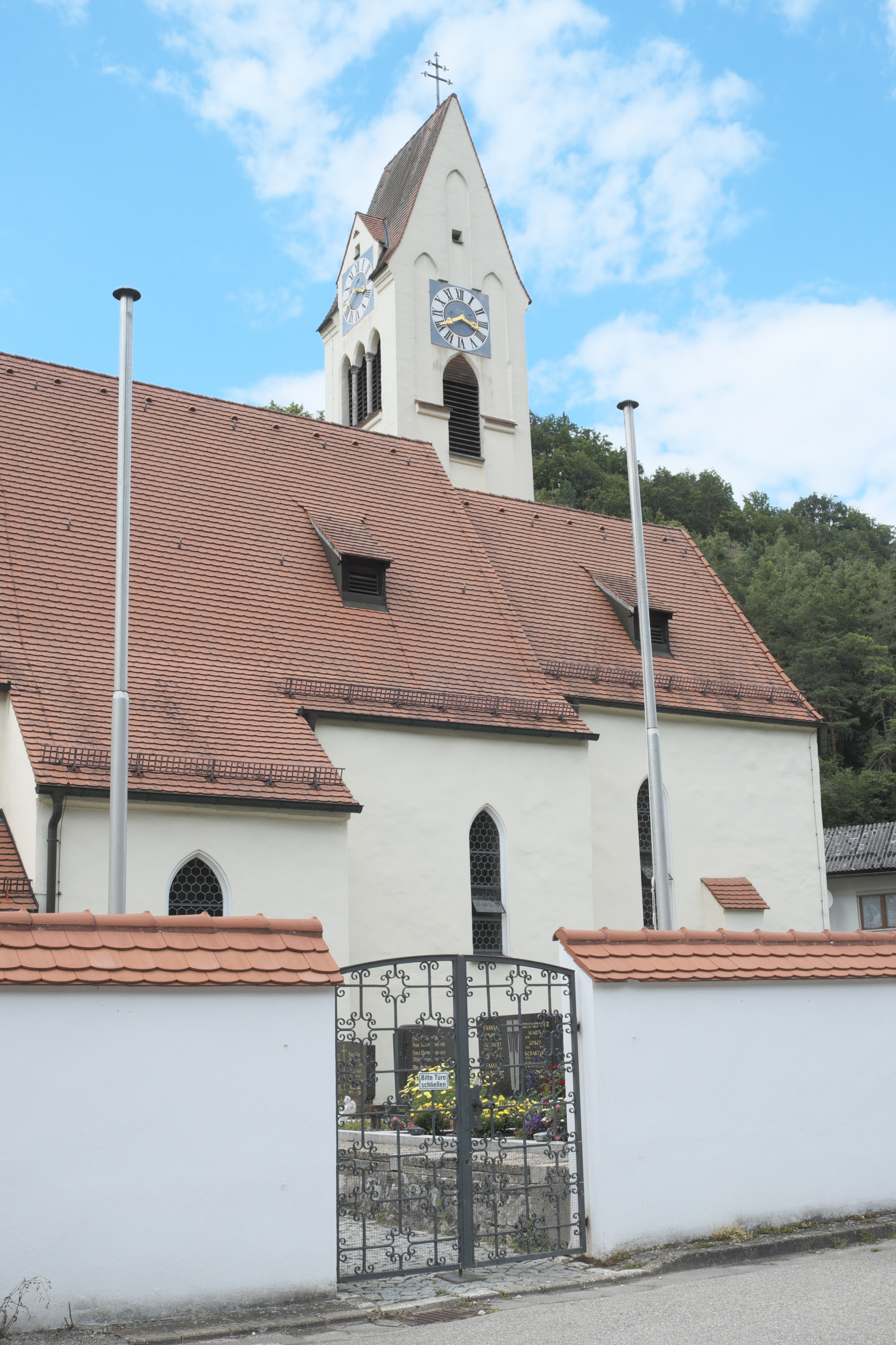 Ehemalige Johanniterkirche, heutige Pfarrkirche St. Johannes in Altmühlmünster (Riedenburg) im niederbayerischen Landkreis Kelheim (Bayern/Deutschland)